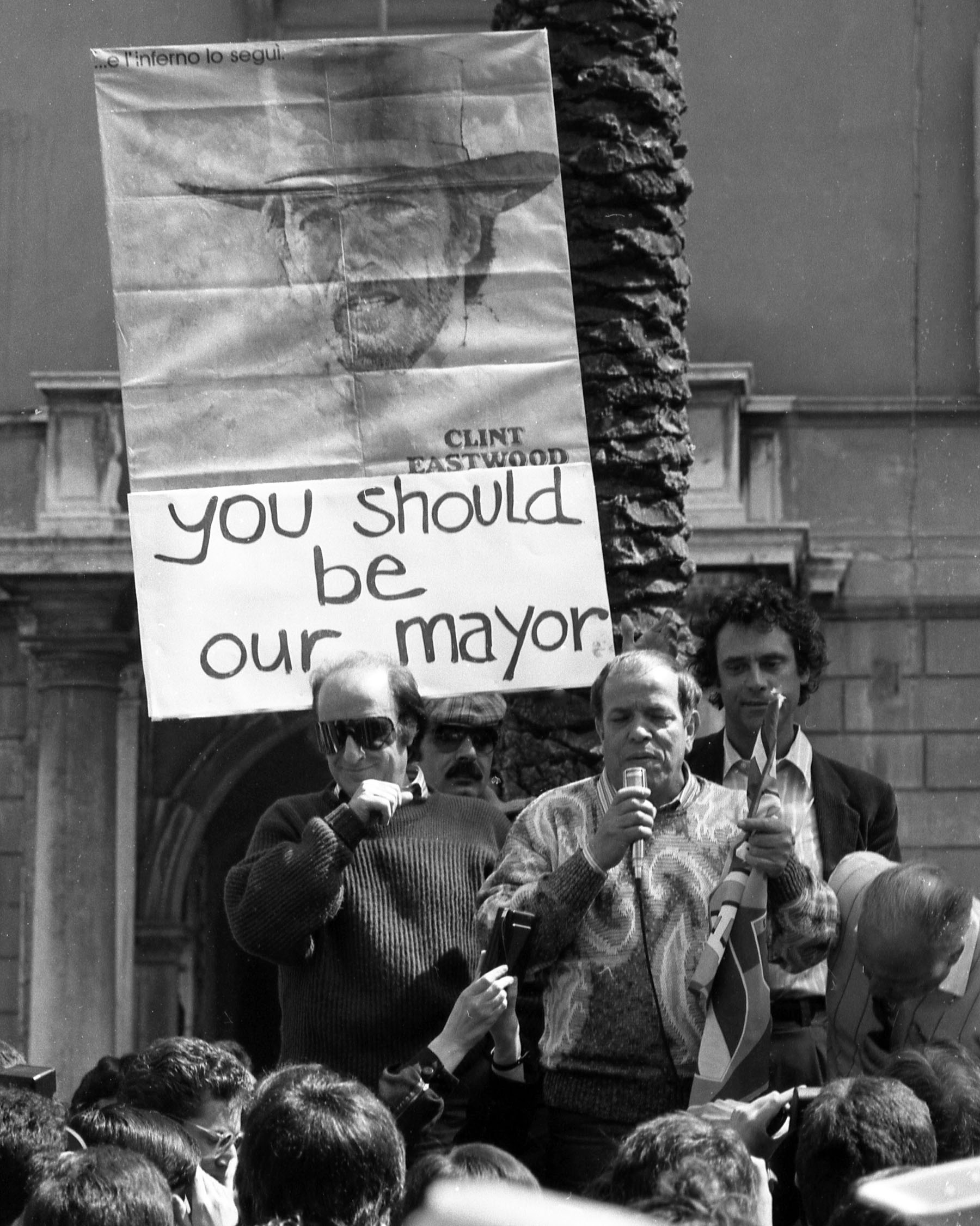 Bombolo parla alla manifestazione Anti fats food Piazza di Spagna 1986